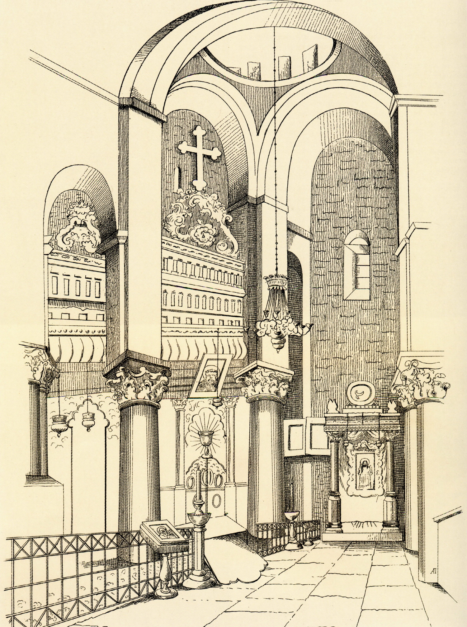 Клингер И., Шульце А. Внутренность греческой церкви в Керчи. (С натуры). 1854 г